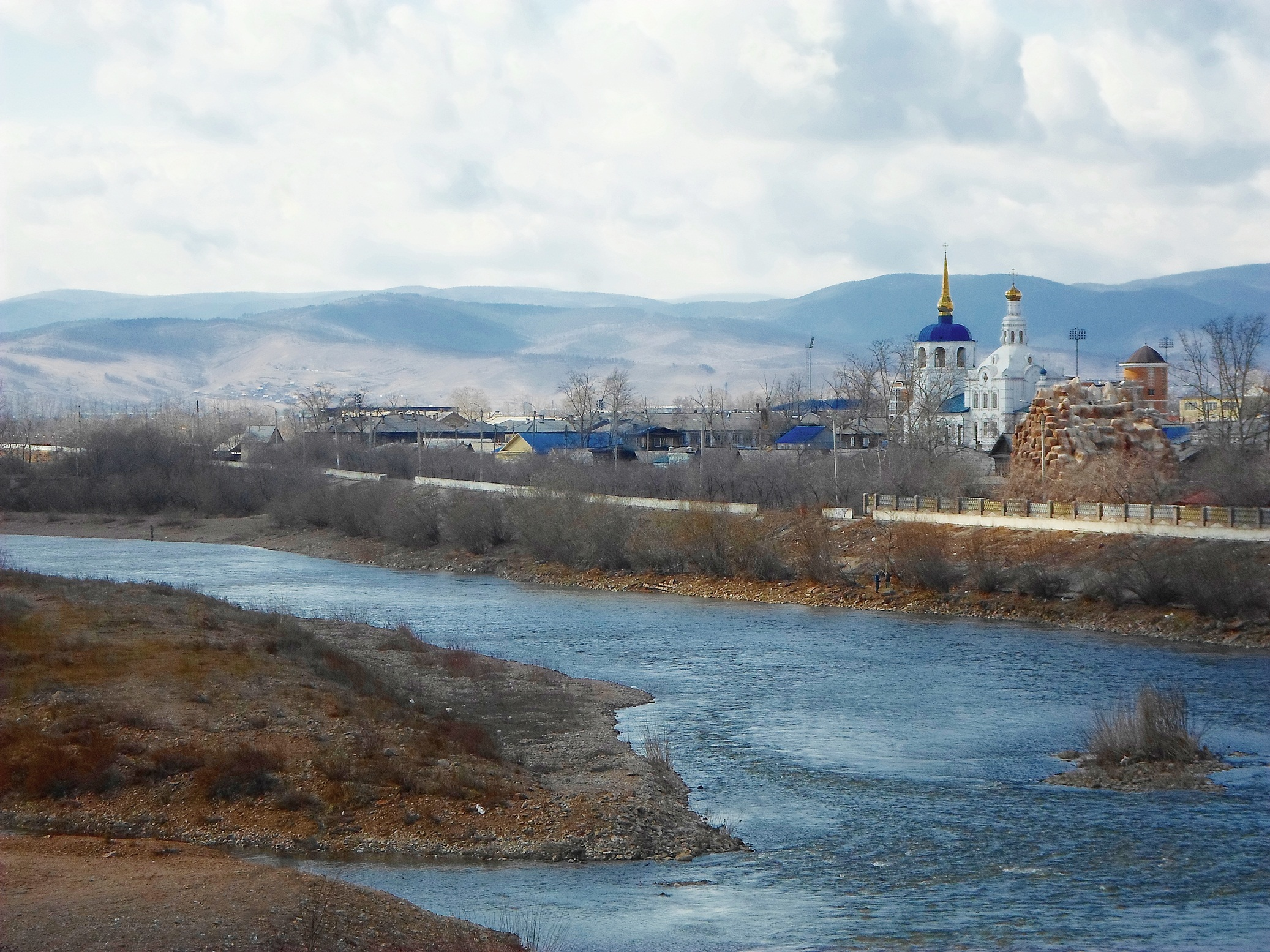 Улан-Удэ. Река Уда близ устья. Вдали - Одигитриевский собор. Вид с Удинского моста.